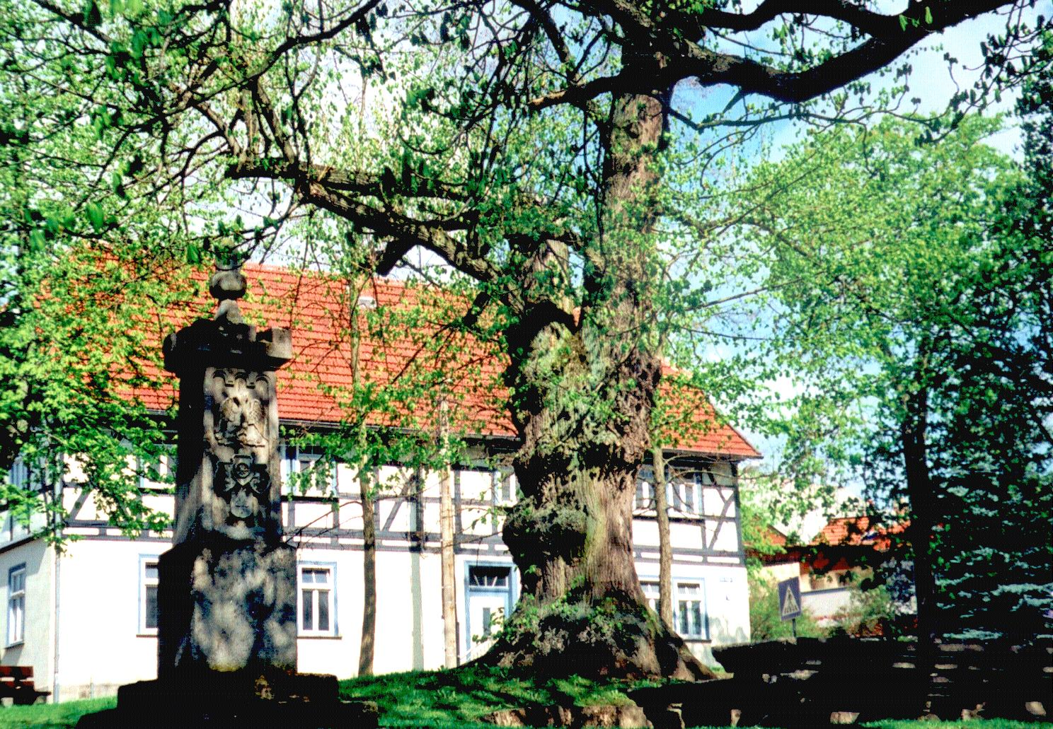 Westseite des Oberdorlaer Angers mit Denkmal, alter Sommerlinde und Steintisch.